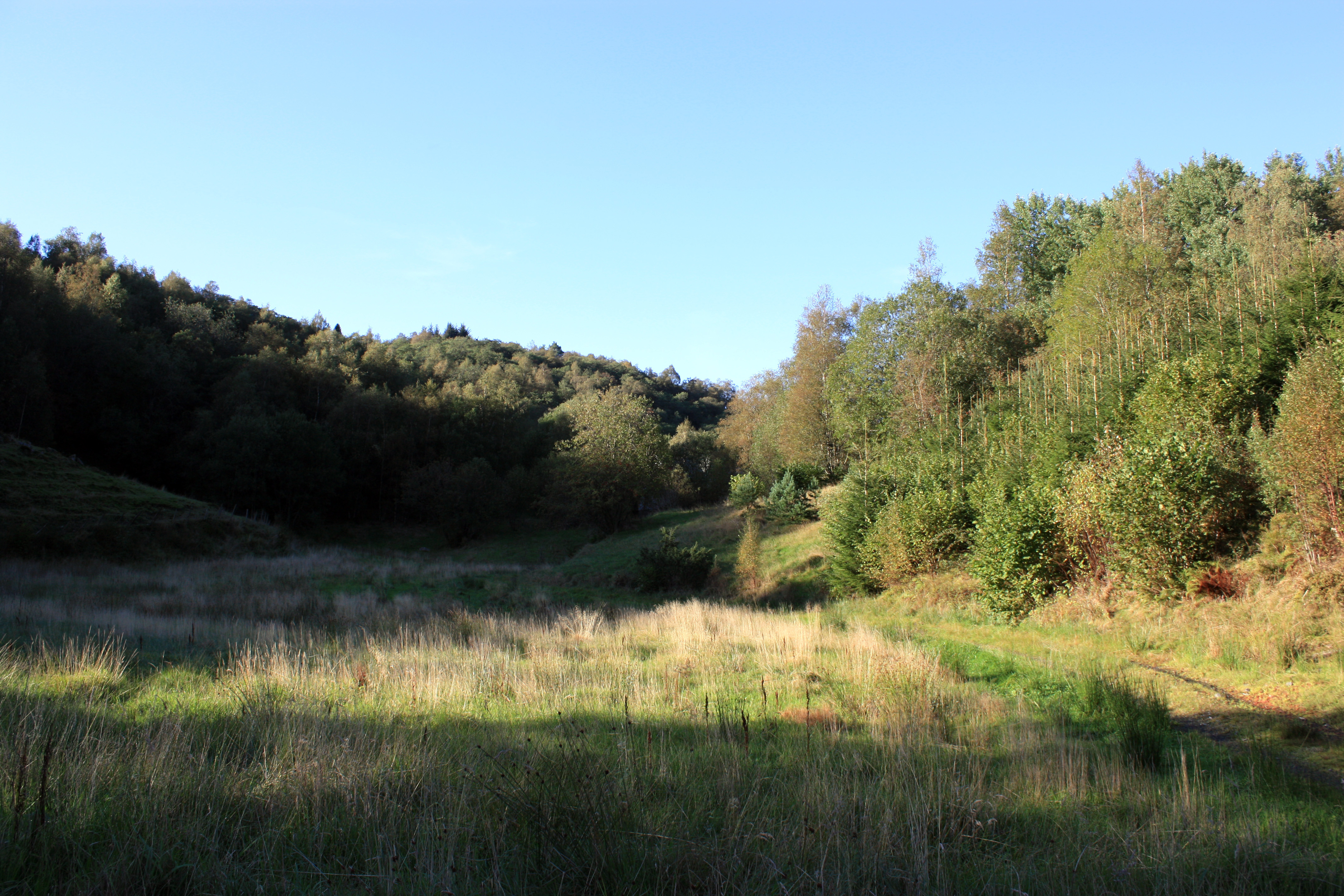 Milleshaug, Fana, Bergen.